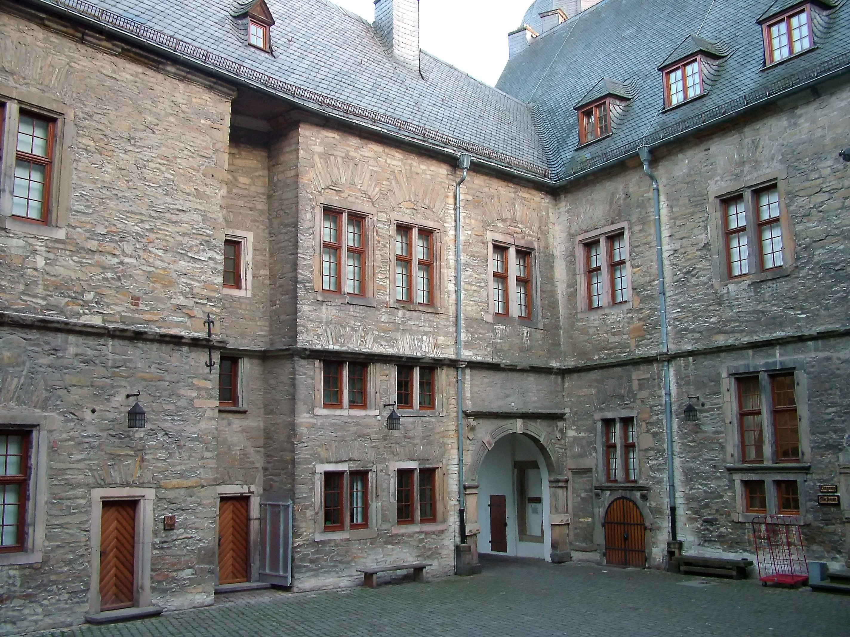 Wewelsburg, Innenhof